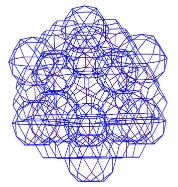 A triakontaéder alakú ikozi-ikozaéder rajza számítógéppel